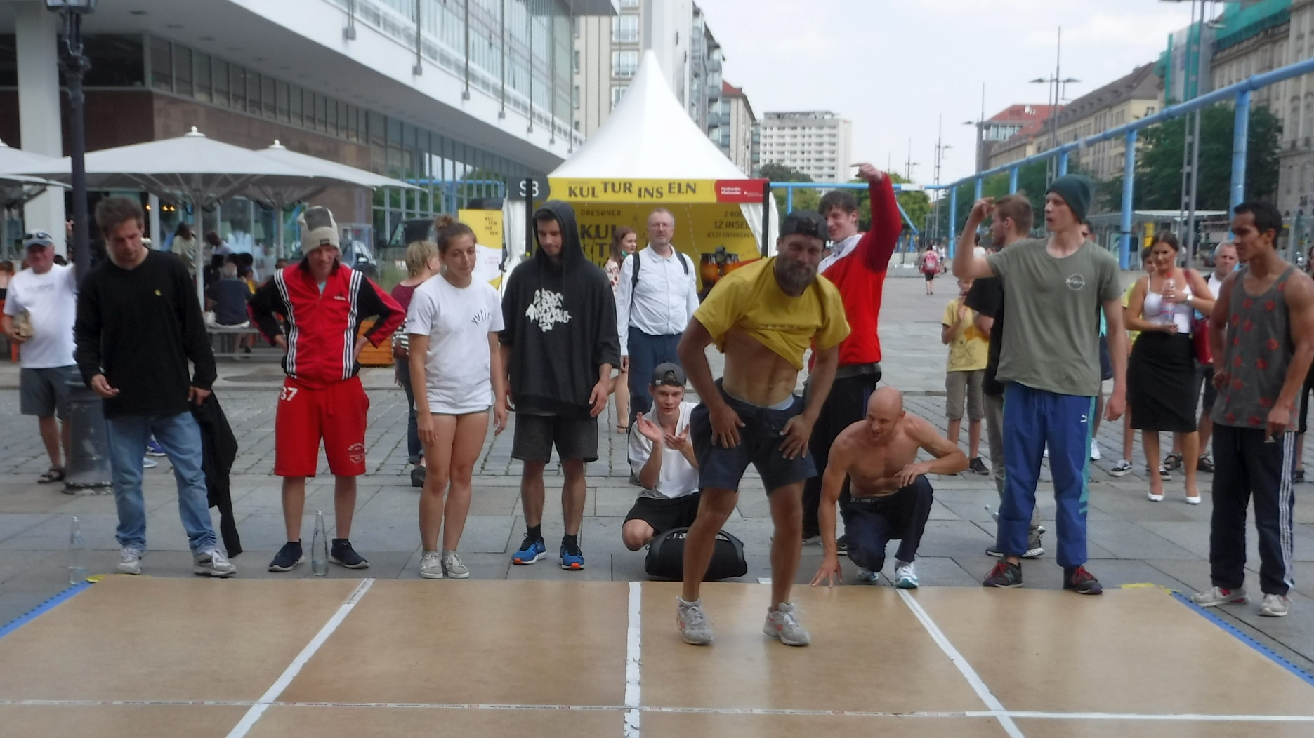 The Saxonz bei den Dresdner Kulturinseln 2020